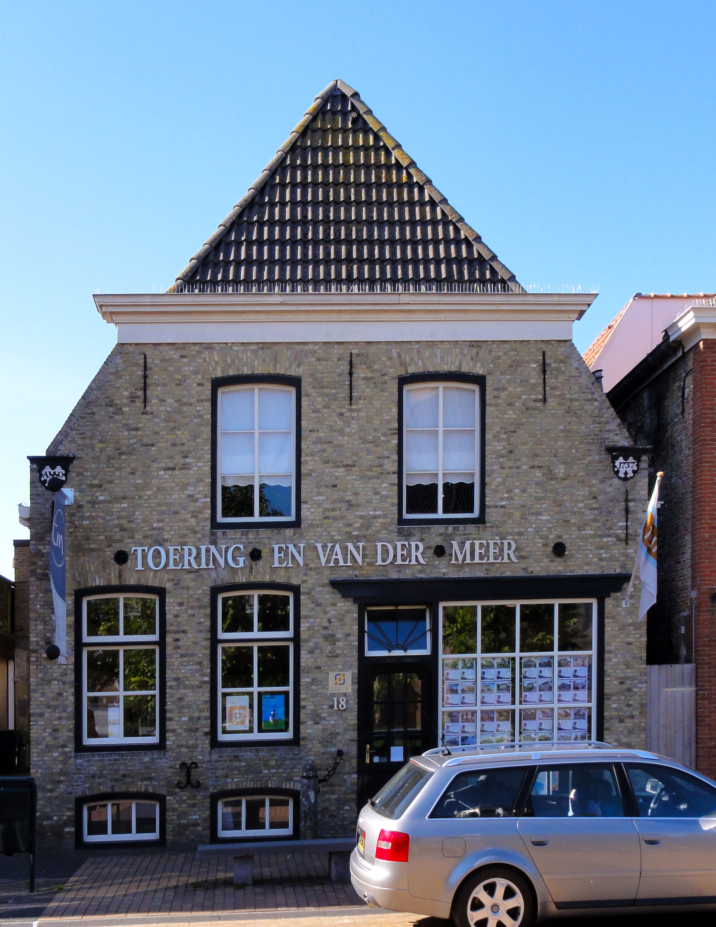 Van_Harenstraat 18 in Sint-Annaparochie